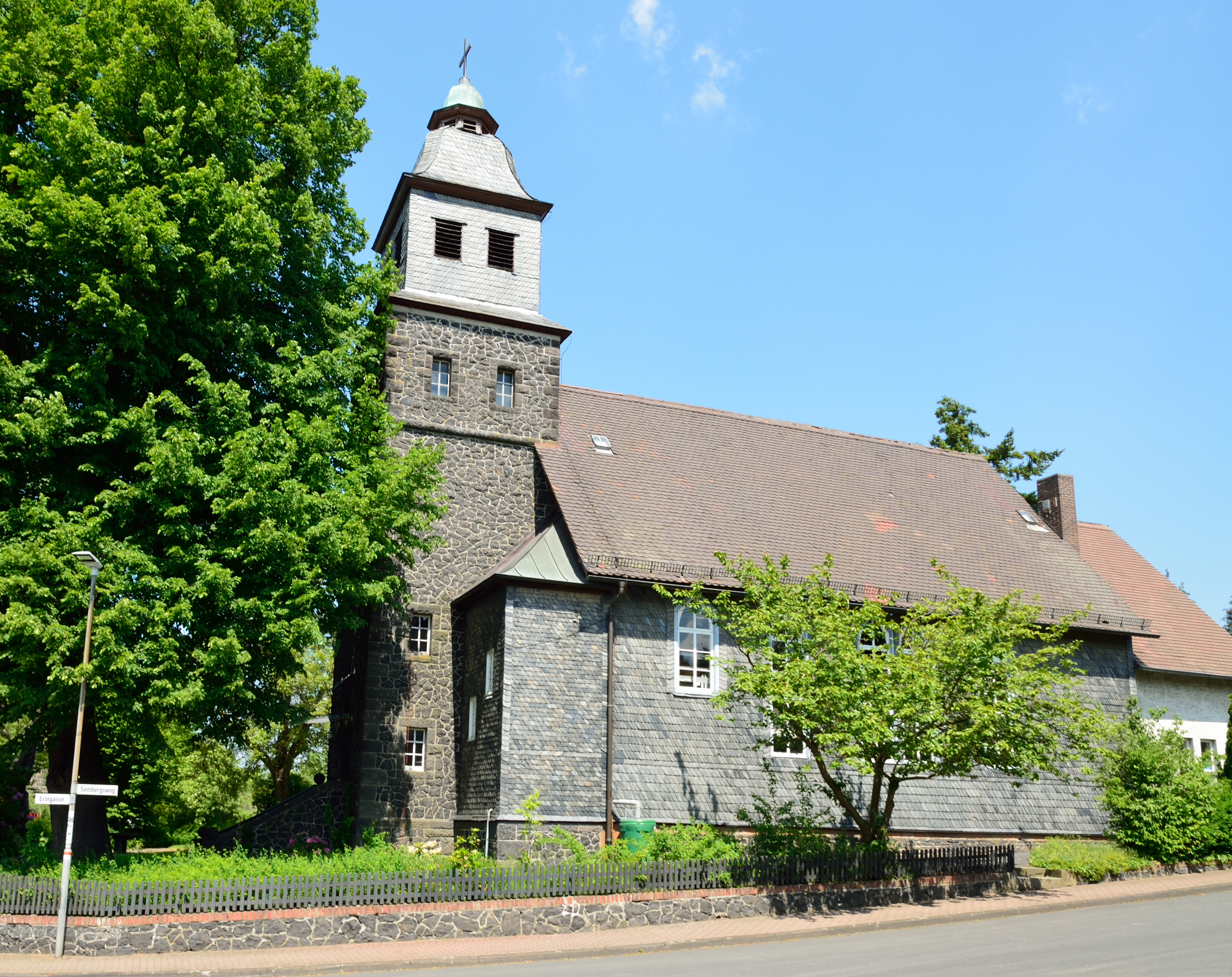 Selbständige Ev.-Luth. Kirche (SELK) Dreihausen (Ebsdorfergrund)